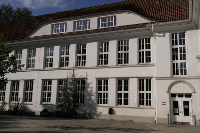 Vietorschule, Lyzeum Vietor in Bremen, Carl-Schurz-Straße 25Das abgebildete Objekt ist ein geschütztes Kulturdenkmal in der Freien Hansestadt Bremen, mit der Nr. 0259 beim Landesamt für Denkmalpflege registriert.